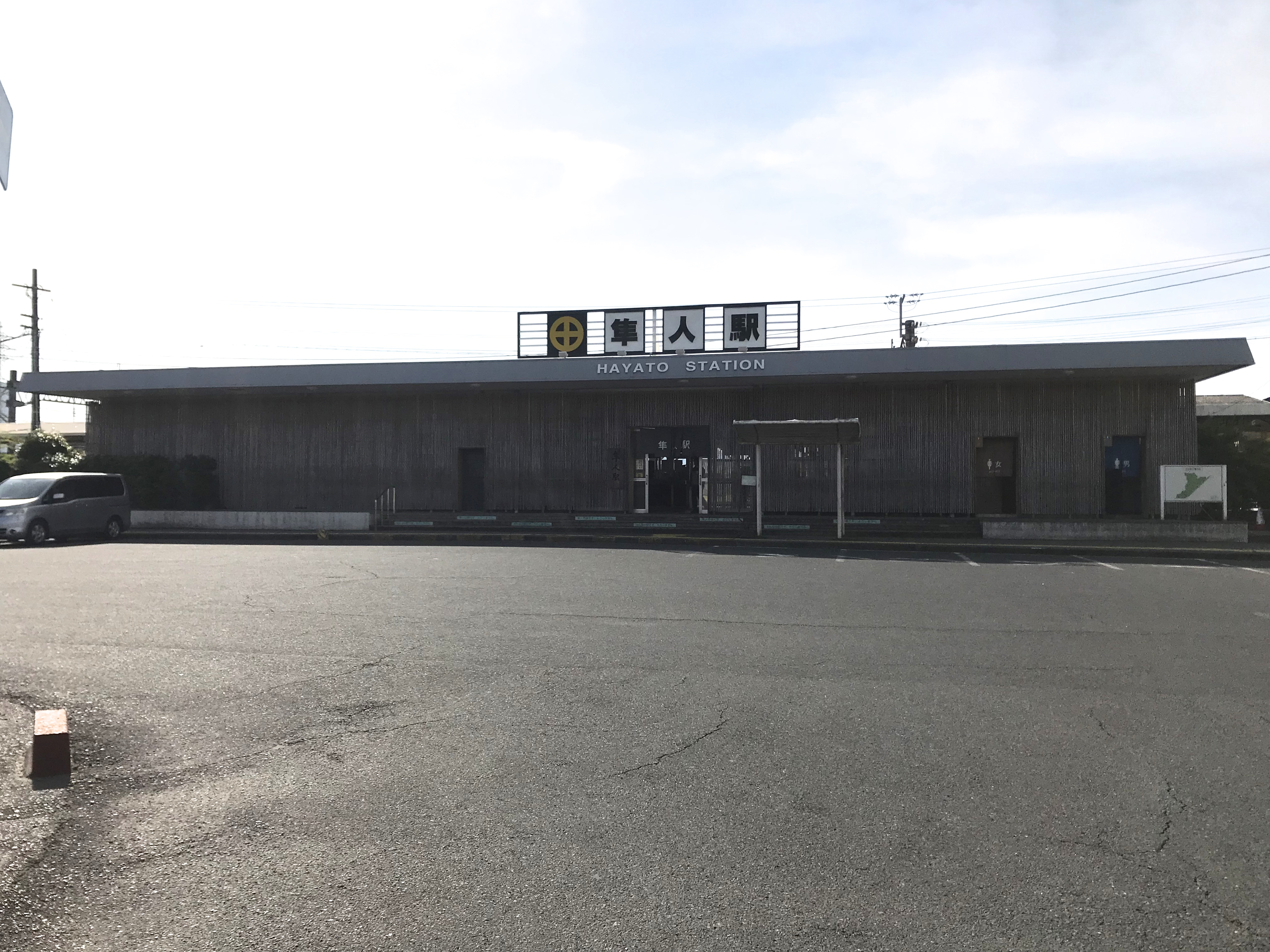 隼人駅の駅舎